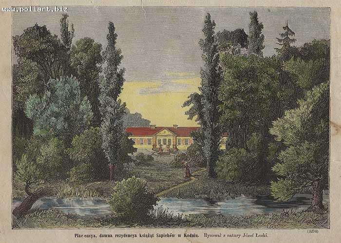 Pałac Placencja w Kodniu, rysunek J. Łoskiego